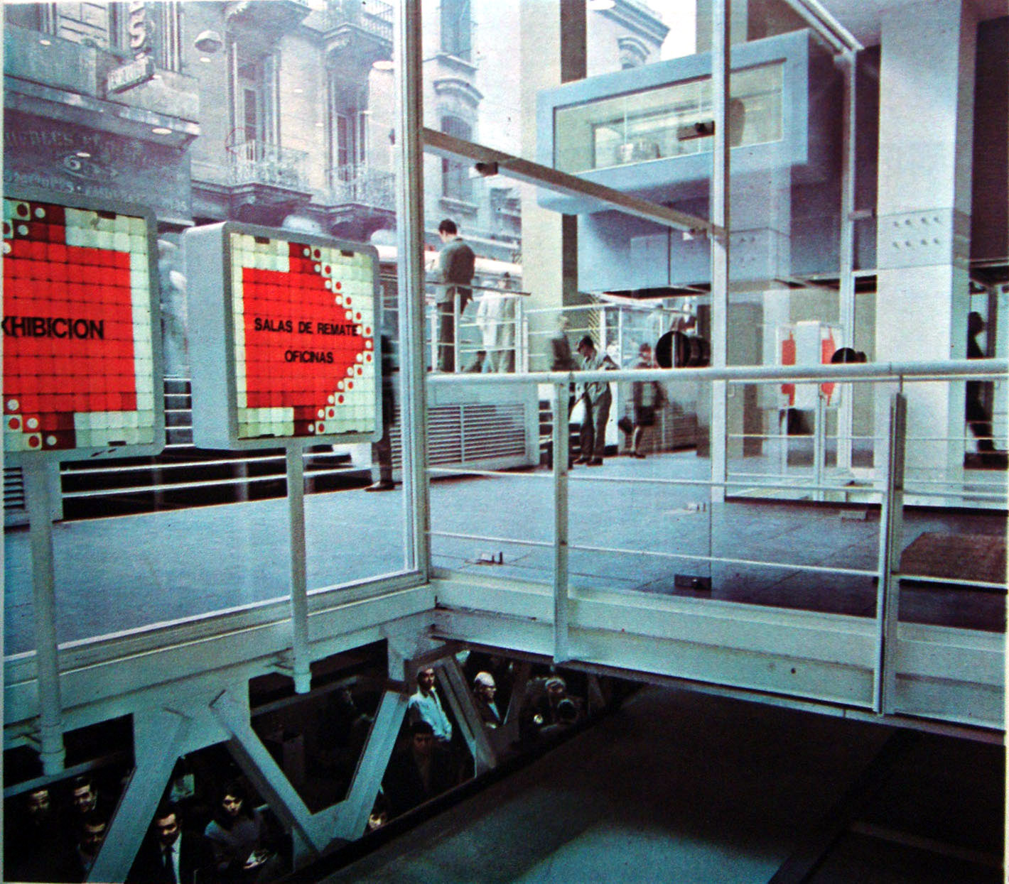 Vista desde el interior del Edificio Ventas (Esmeralda 660) del entonces Banco Municipal de Buenos Aires, hoy Banco Ciudad de Buenos Aires. El edificio, construido en 1939, fue totalmente modificado en 1969 por el estudio de arquitectura Manteola, Petchersky, Sanchez Gómez, Santos, Solsona y Viñoly.